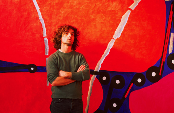 Portrait de l'artiste Pascal François par Yukinori Sakurai.